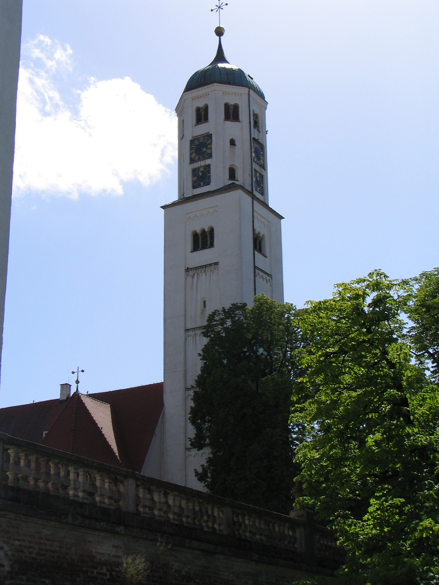 Schloss Kirchheim/Schwaben Schlosskirche